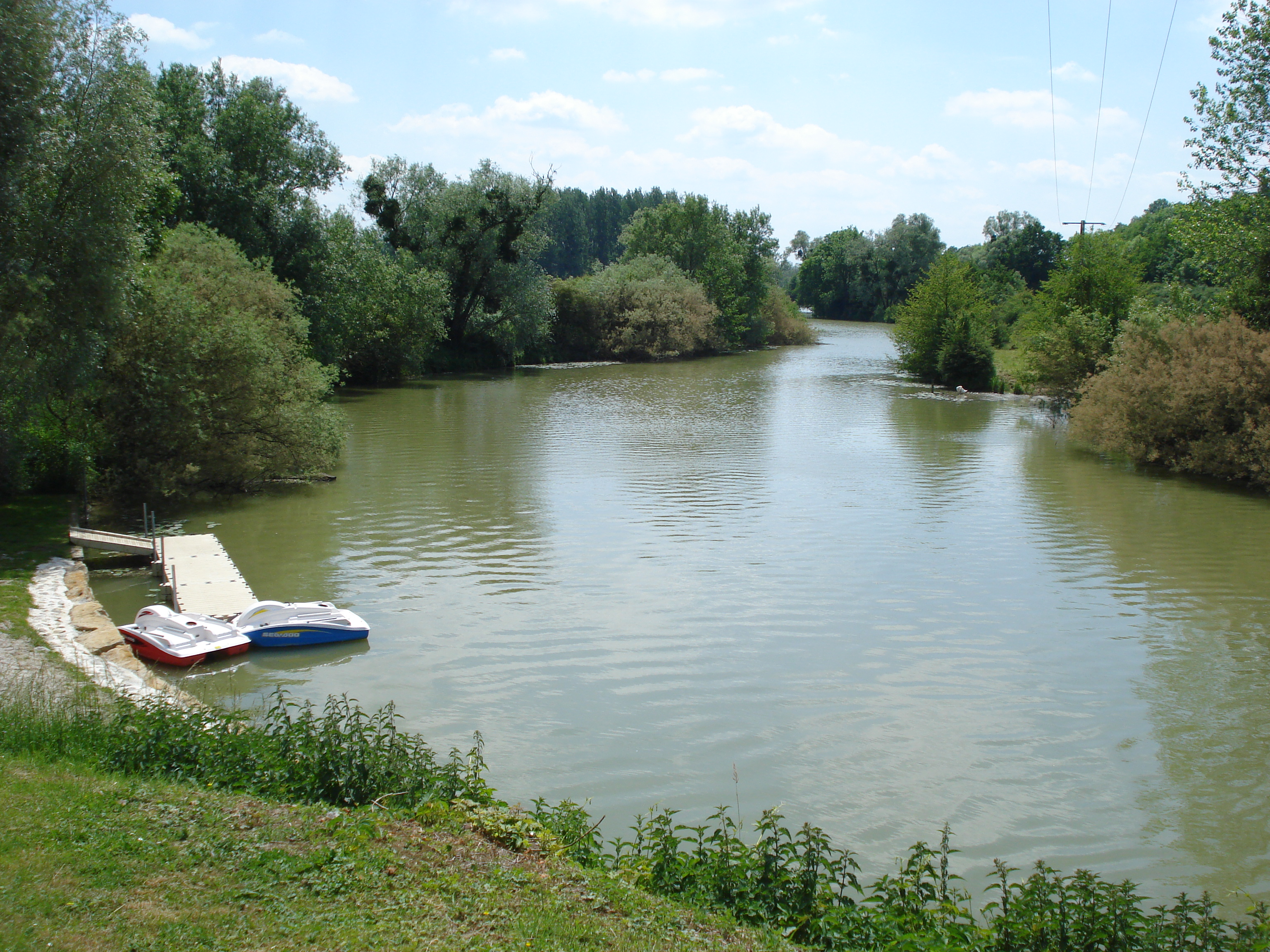 Aisne river at Semuy (Ardennes, Fr).